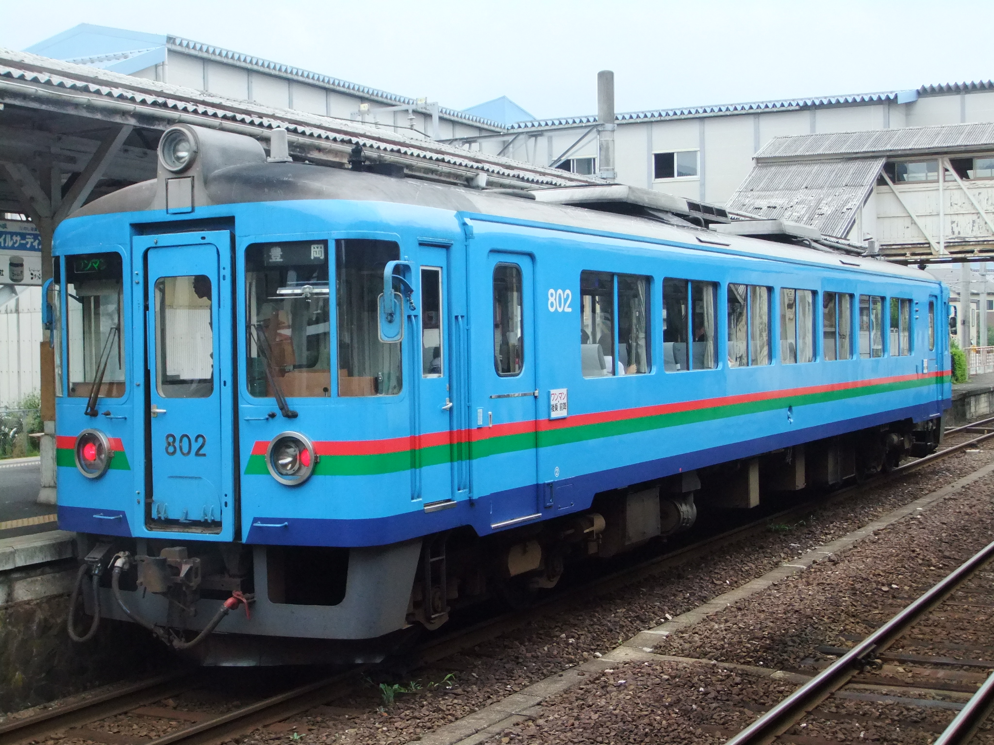 京都丹後鉄道 802号 更新車両